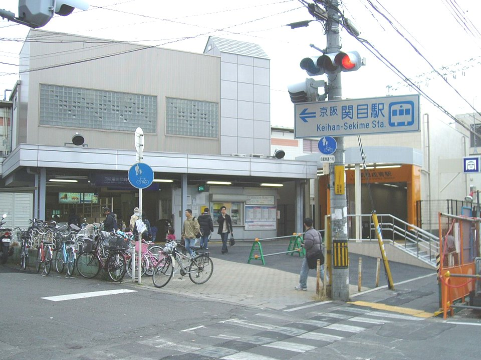 京阪関目駅と大阪市交関目成育駅1号出入口